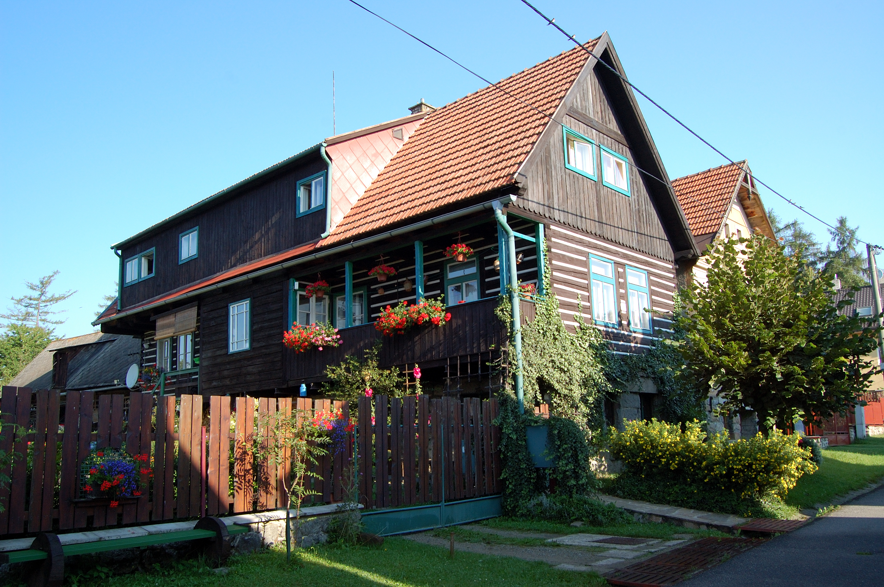 Ludovy dom v obci Stola